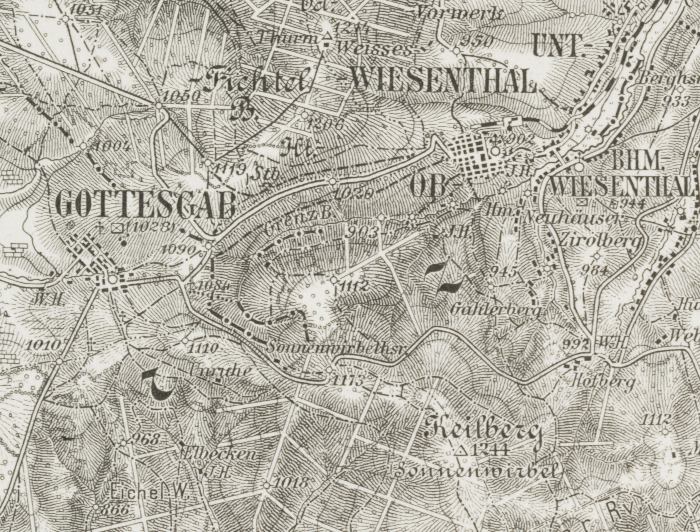 Ausschnitt aus: Kaaden und St. Joachimsthal.; Spezialkarte der osterreichisch-ungarischen Monarchie.